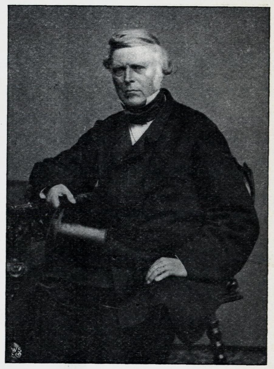 Illustrasjon hentet fra boken "En Christianiensers Erindringer fra 1850- og 60-Aarene" av Nielsen, Yngvar og utgitt av Gyldendal (Kristiania, 1910)Depicted person: Carl Arnold (1794-1873)